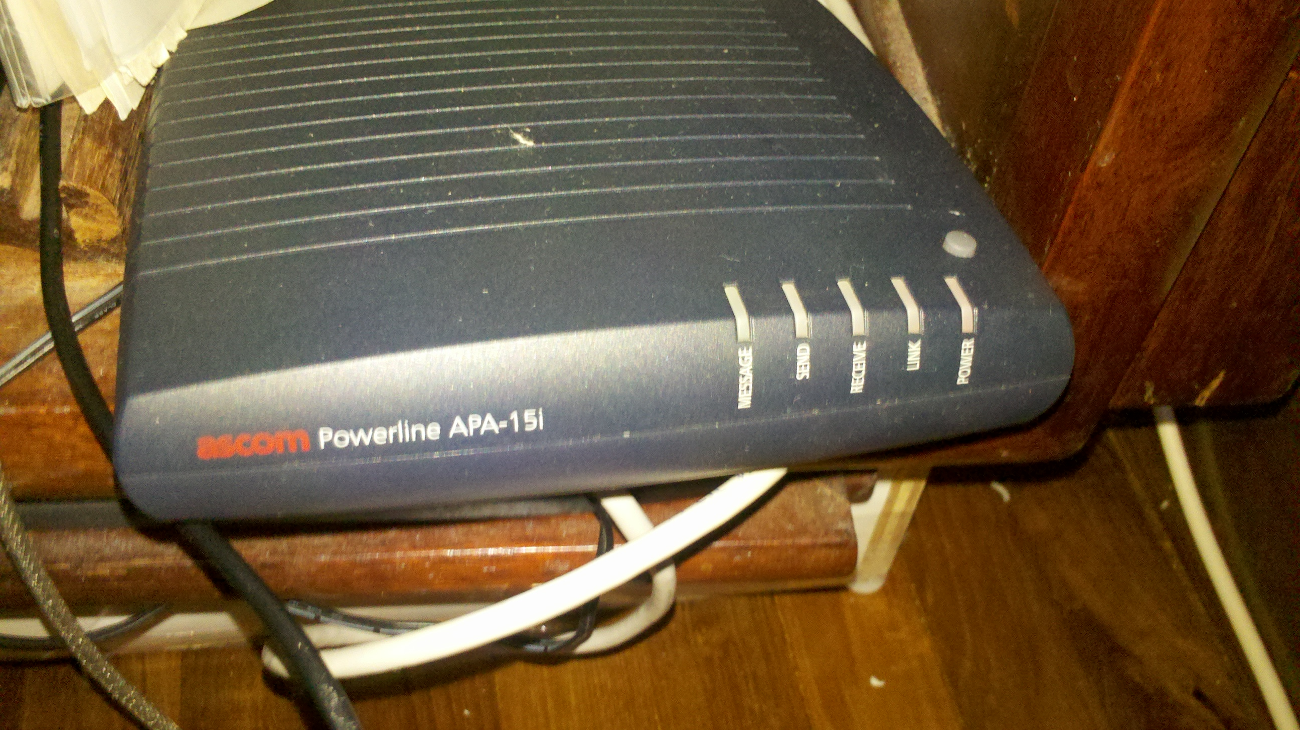 这是由HGC所提供的电联宽频路由器